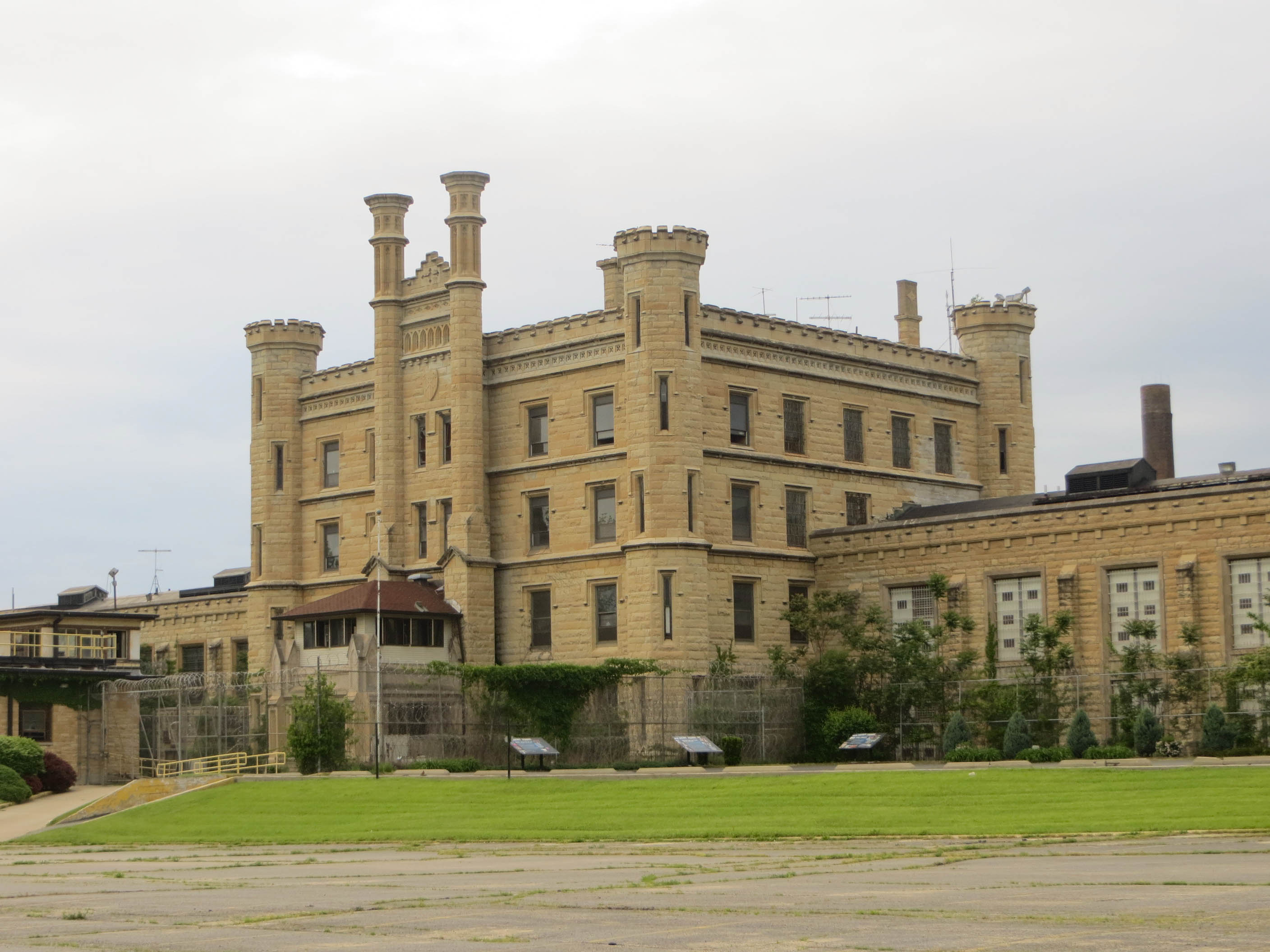 20130525 39 Joliet State Prison-2